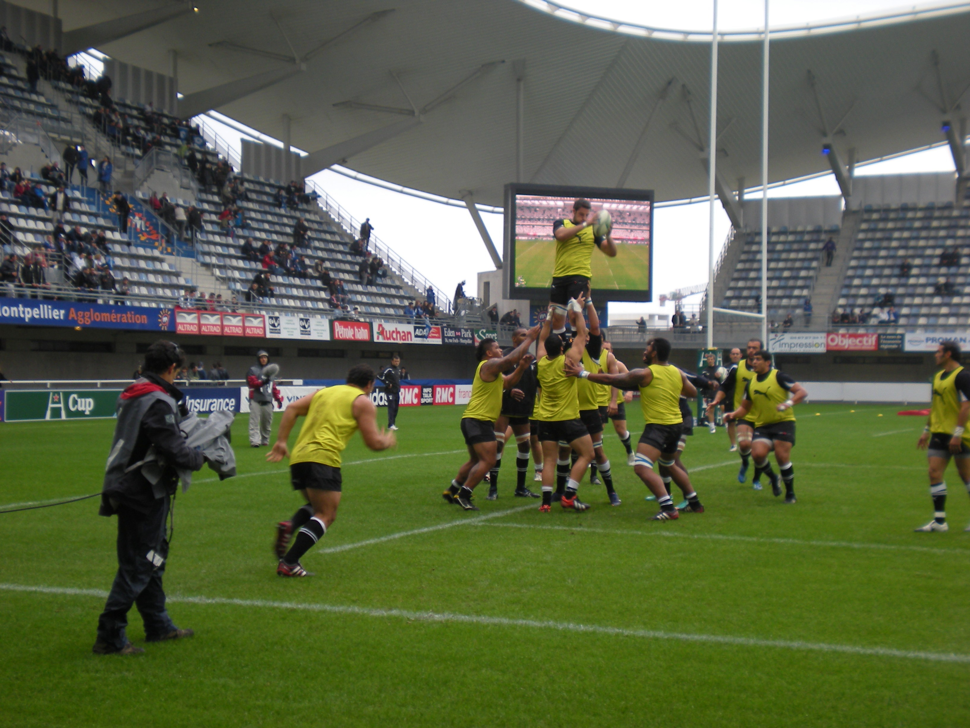 Avant le match MHR-Sale (octobre 2012)